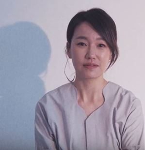 배우 진경만의 스타일대로 영화 '햄릿' 속 대사를 연기했어요. 연기에 있어서 성별의 차이는 전혀 중요하지 않다는 것을 보여주는 ‘젠더프리’ 영상을 함께 한 진경.